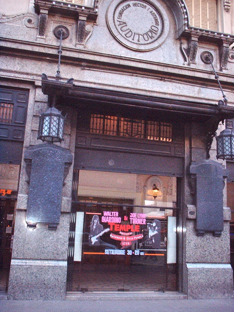 Teatro Hector Astengo